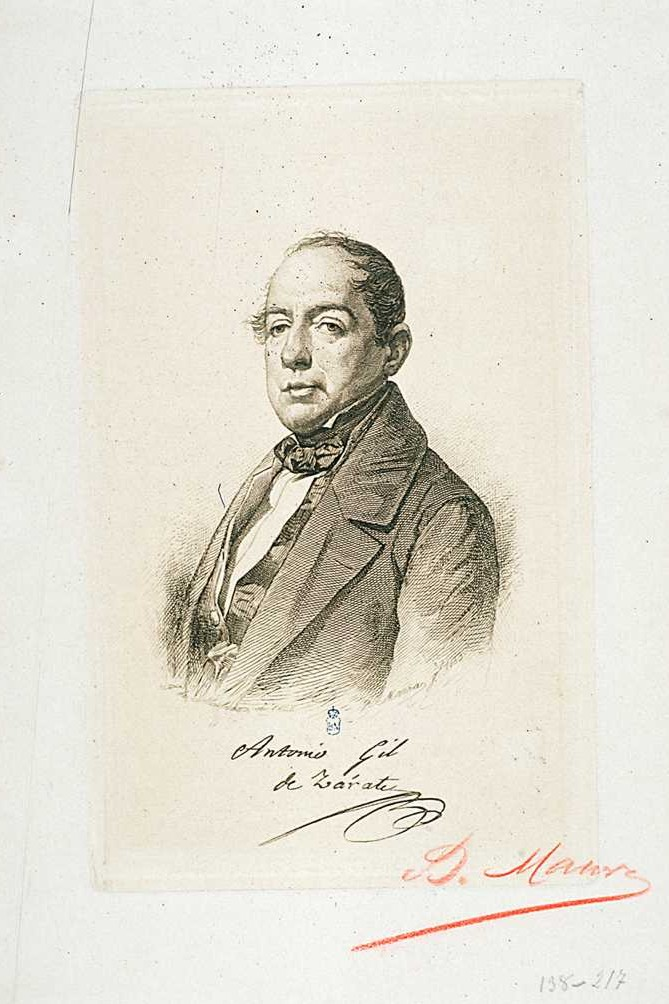 Retrato de Antonio Gil y Zárate. 1 estampa aguafuerte; huella de la plancha 218x139 mm, en h. de 283x192 mm. Car. físicas: Aguafuertes-España-S.XIX Notas: Facsímil del autógrafo: "Antonio Gil de Zárate". Estampa suelta de: Autores dramáticos contemporáneos y joyas del teatro español del siglo XIX... / con un prólogo general del señor Antonio Cánovas del Castillo... Madrid: [s.n.]